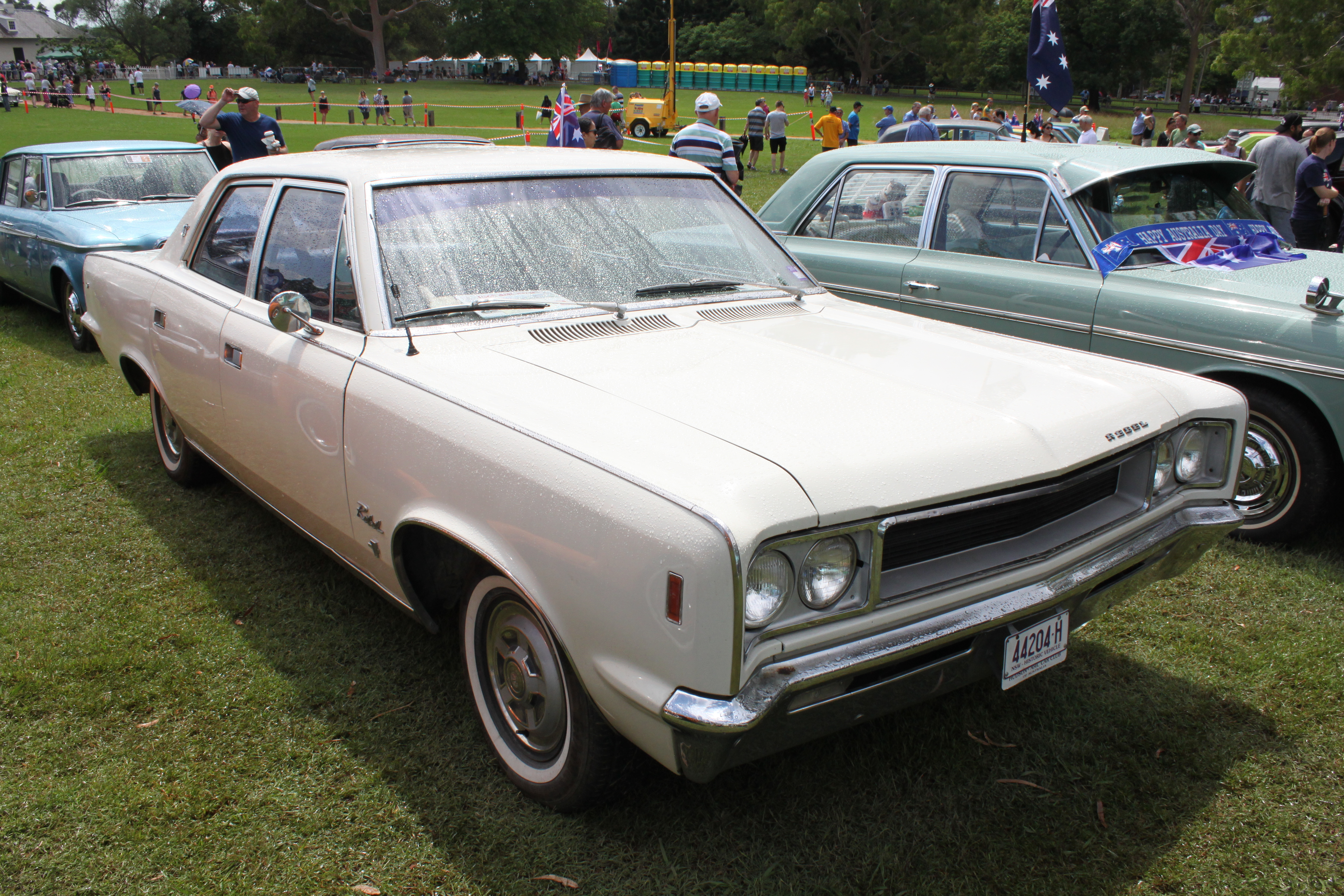 CARnivale, Parramatta Park, NSW Australia Day 2016